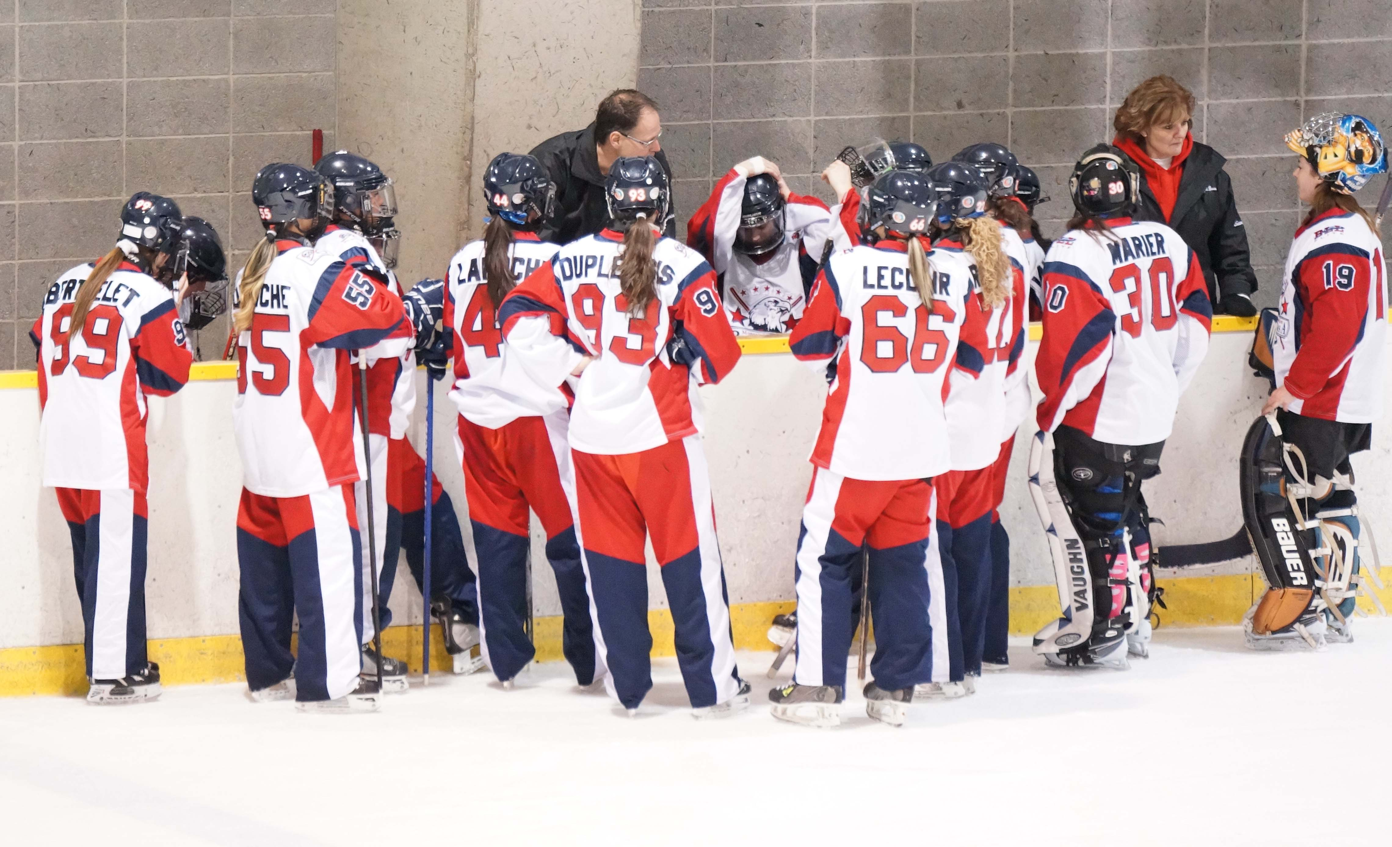 Ringuette